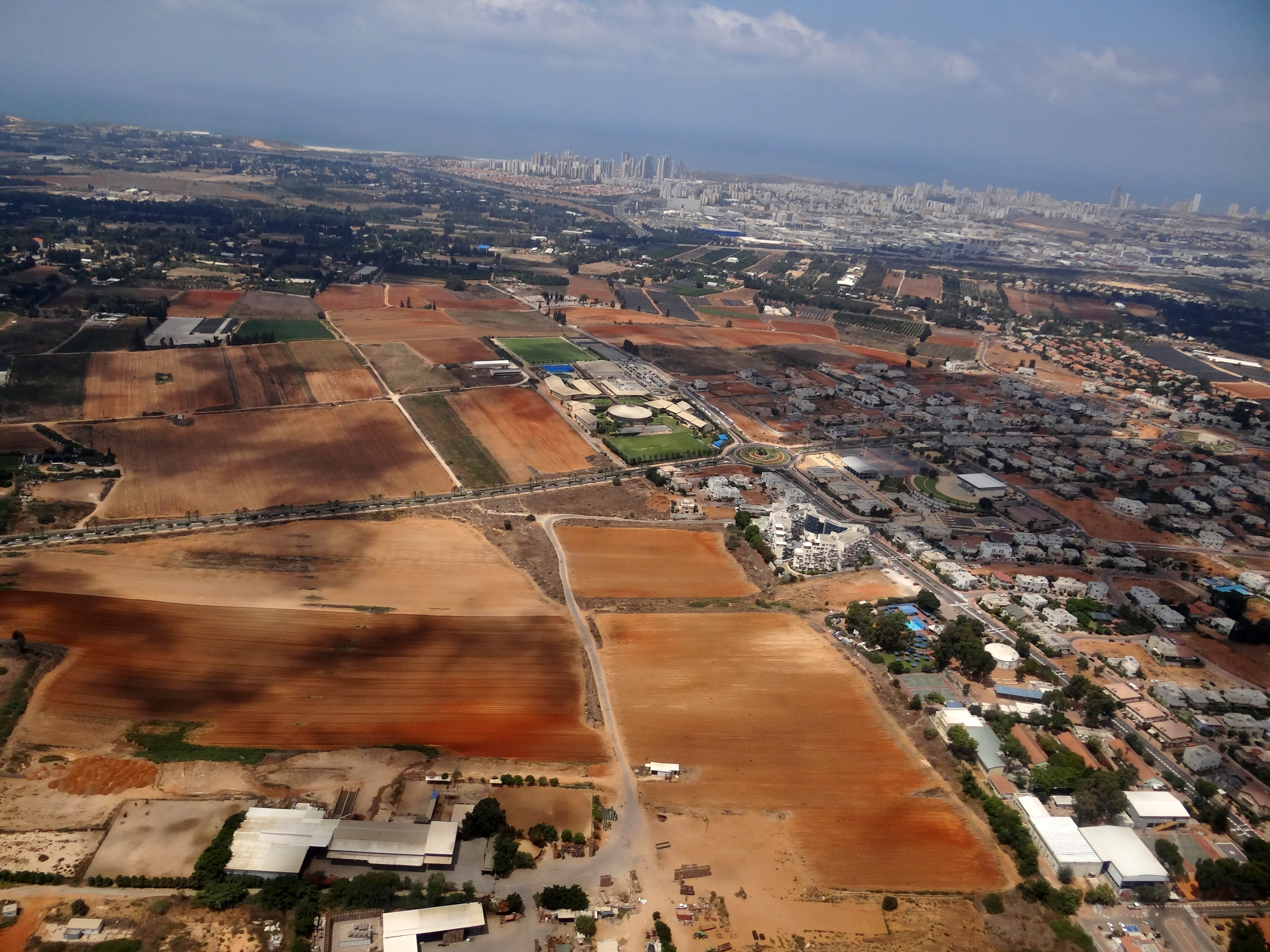 אבן יהודה וכפר נטר בשרון